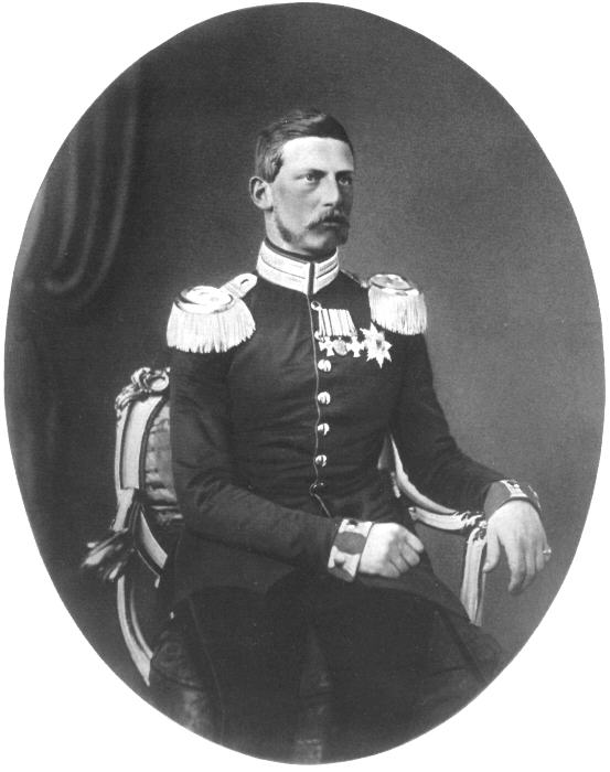 Príncipe Frederico da Prússia (futuro Frederico III).